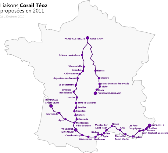 Carte des liaisons Corail Téoz en 2010